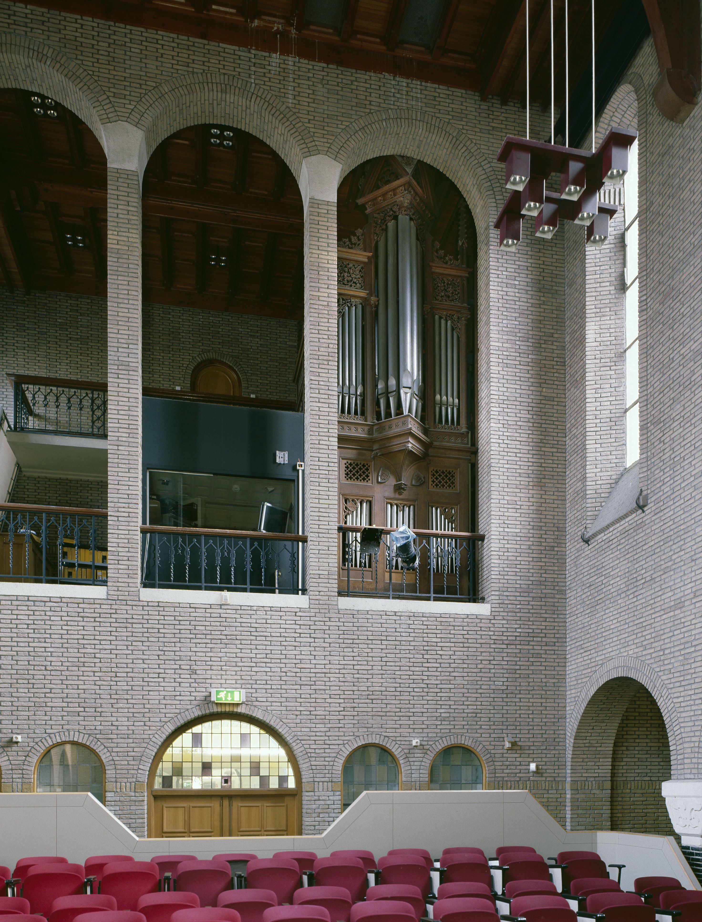 Jezuietenklooster: Interieur, aanzicht orgel,orgelnummer 2288 (opmerking: Gefotografeerd voor Het Historische Orgel in Nederland 1886-1894, bladzijde 96)